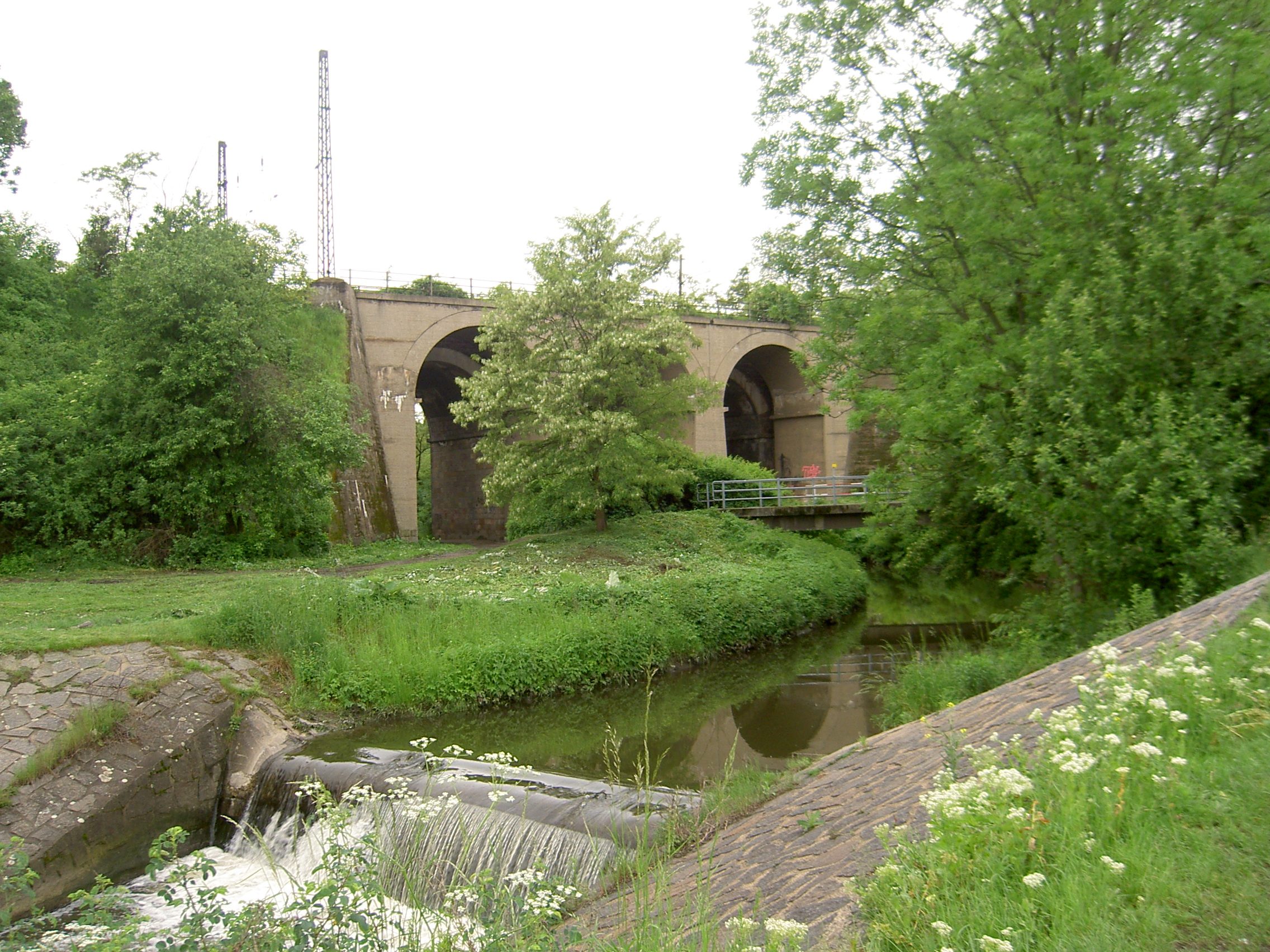 Rokytka u Hořejšího rybníka